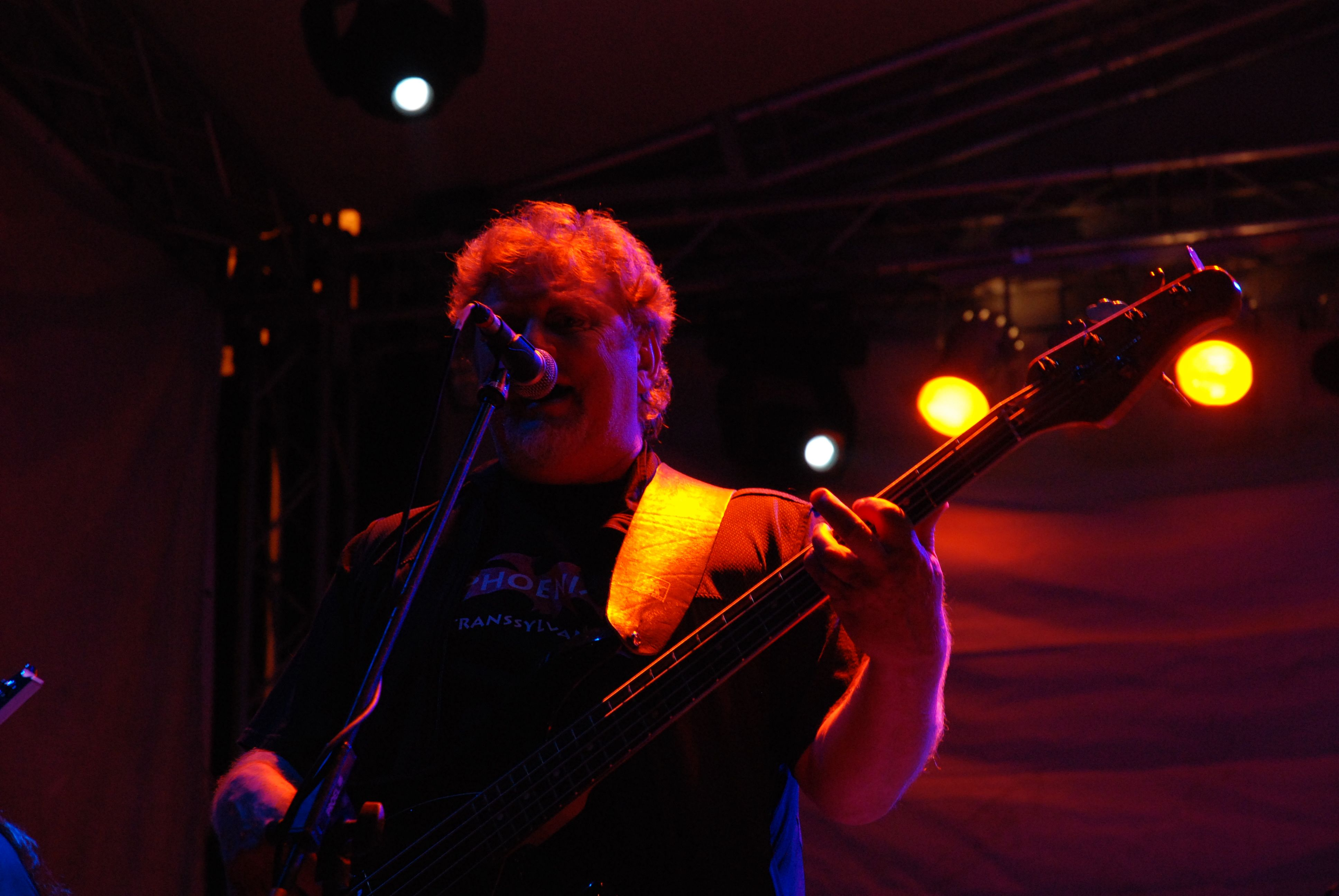 Josef (Ioji) Kappl, concert al formației Phoenix, Șimleu Silvaniei, 14 iulie 2007.